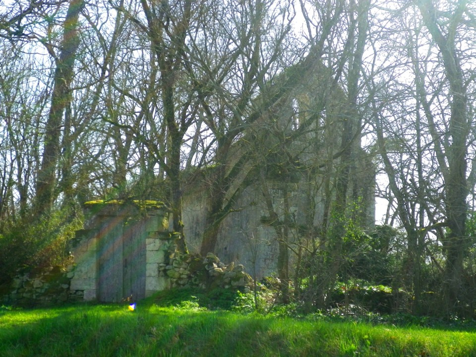 Eglise de Postiac. Commune de Naujan-et-Postiac (33).